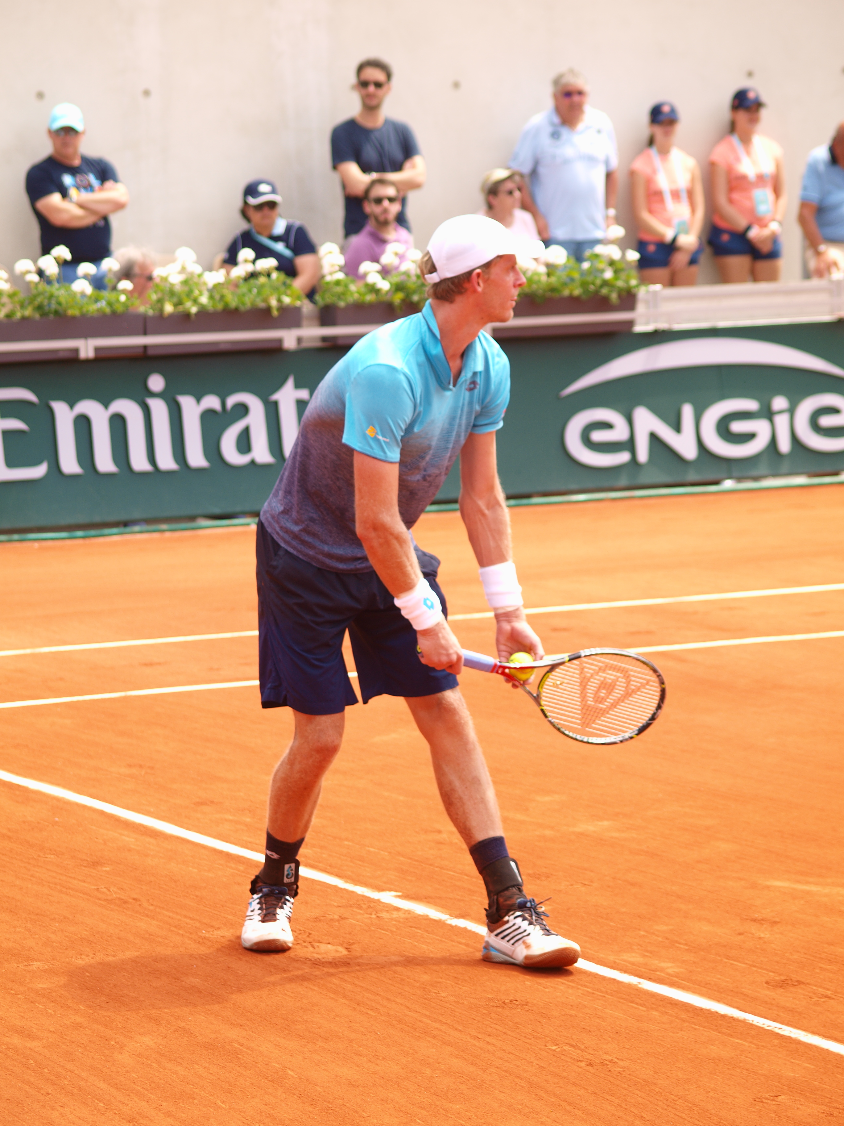 Kevin Anderson lors de son match contre Diego Schwarzmann, sur le cours Suzanne Lenglen (stade Roland Garros à Paris), le 4 juin 2018